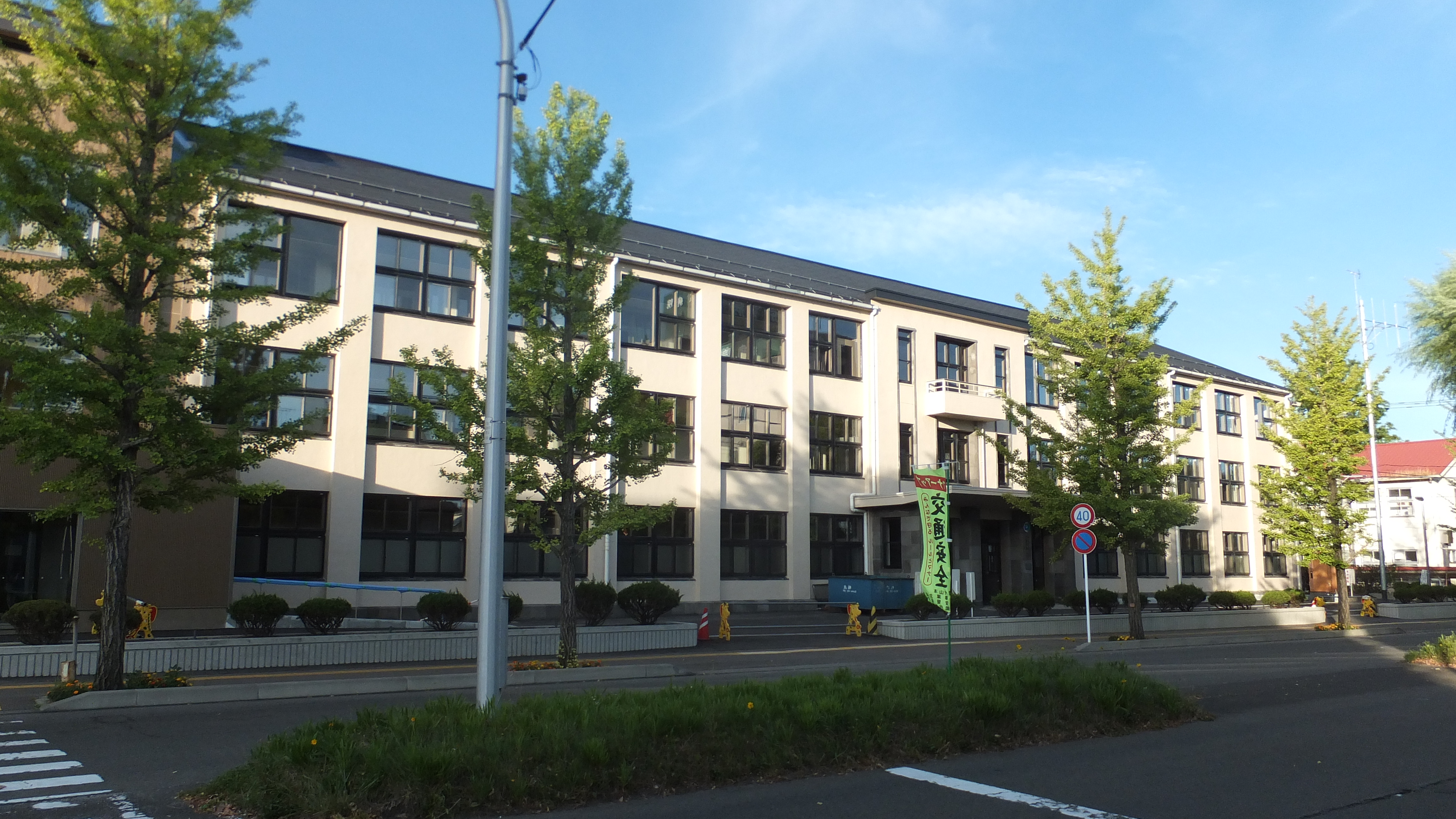 第一庁舎。2017年の新庁舎開庁後、改修工事が行われ、9月より市長室等がこちらに移転する。また、改修工事を経て外壁が白からベージュに塗り直された。 登録有形文化財